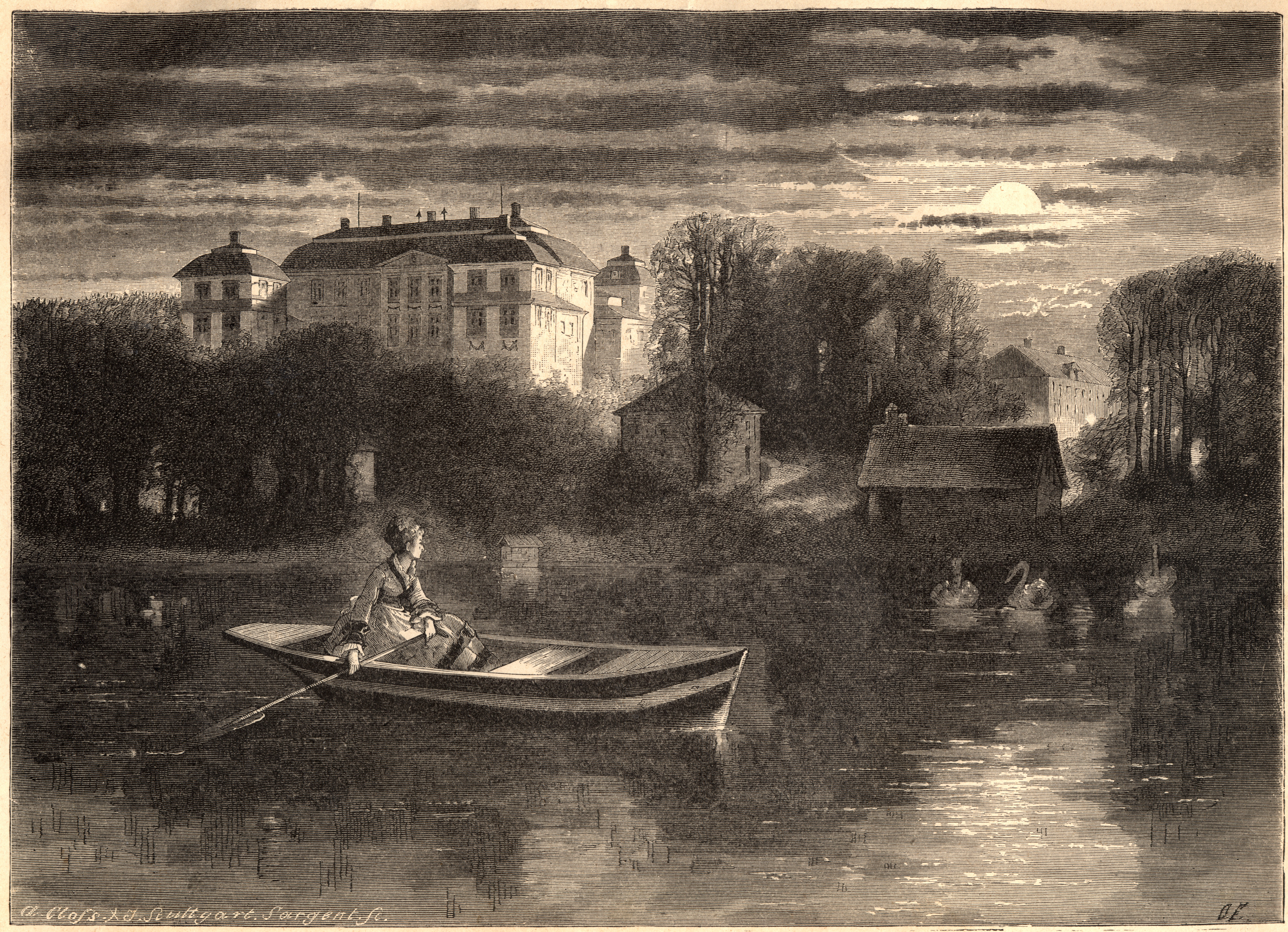 Eriksbergs slott